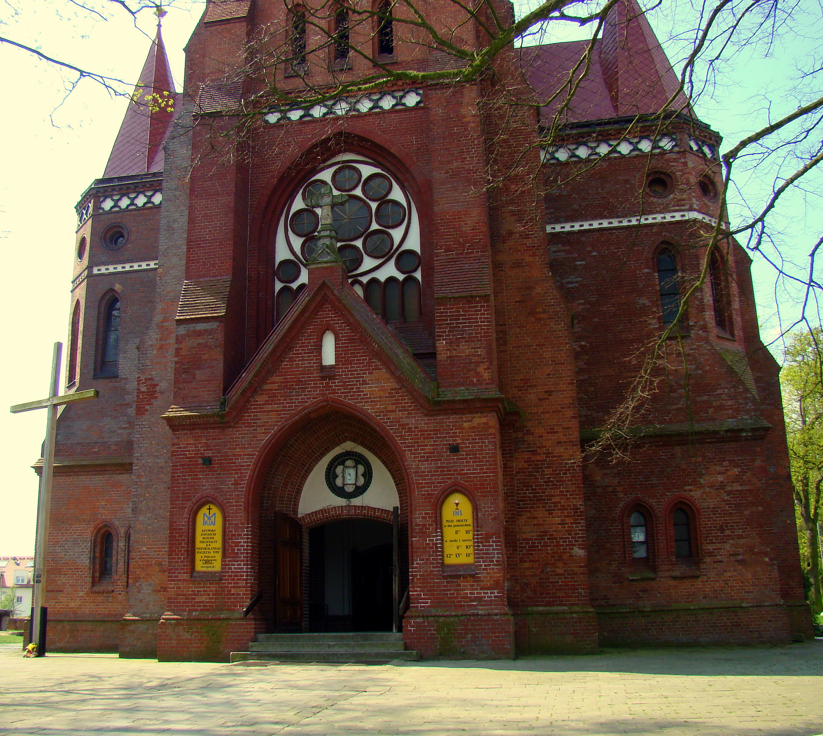 Kościół Niepokalanego Poczęcia NMP w Policach (wejście główne), Polska